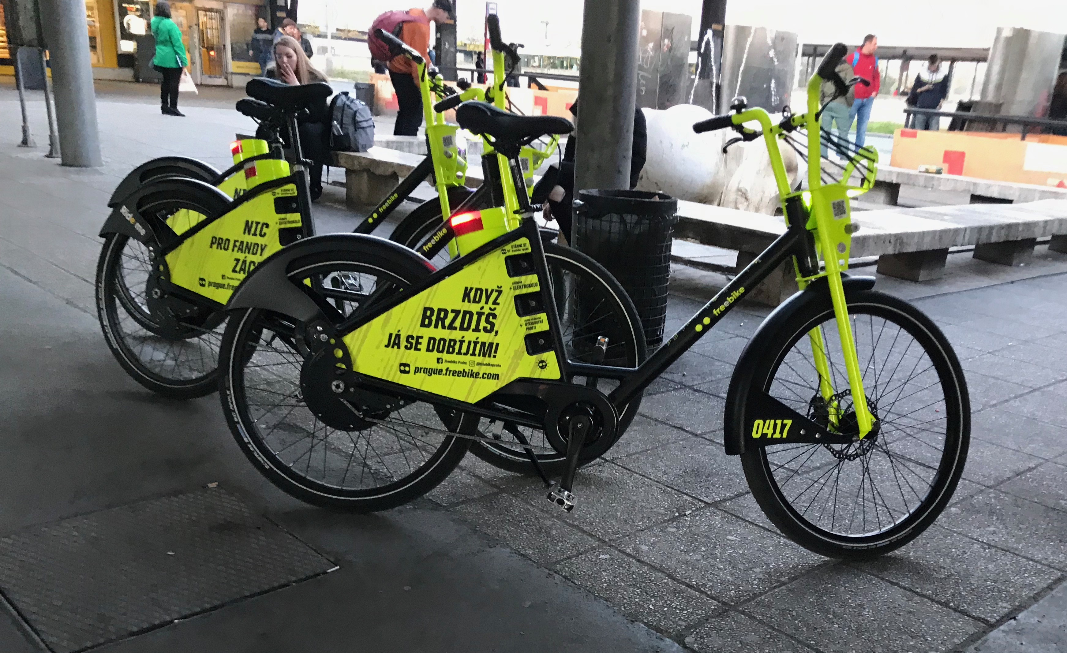 Elektrokola firmy Freebike na stanici metra Kačerov, Praha